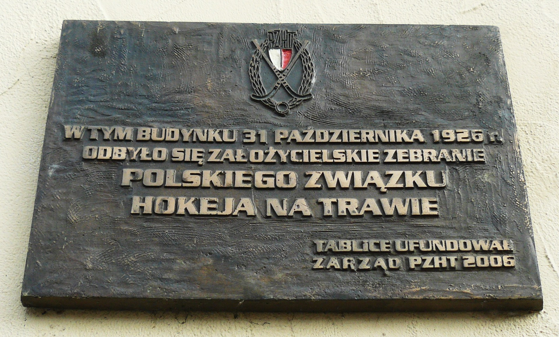 Tablica hokeja na trawie w Poznaniu - ul. Masztalarska.